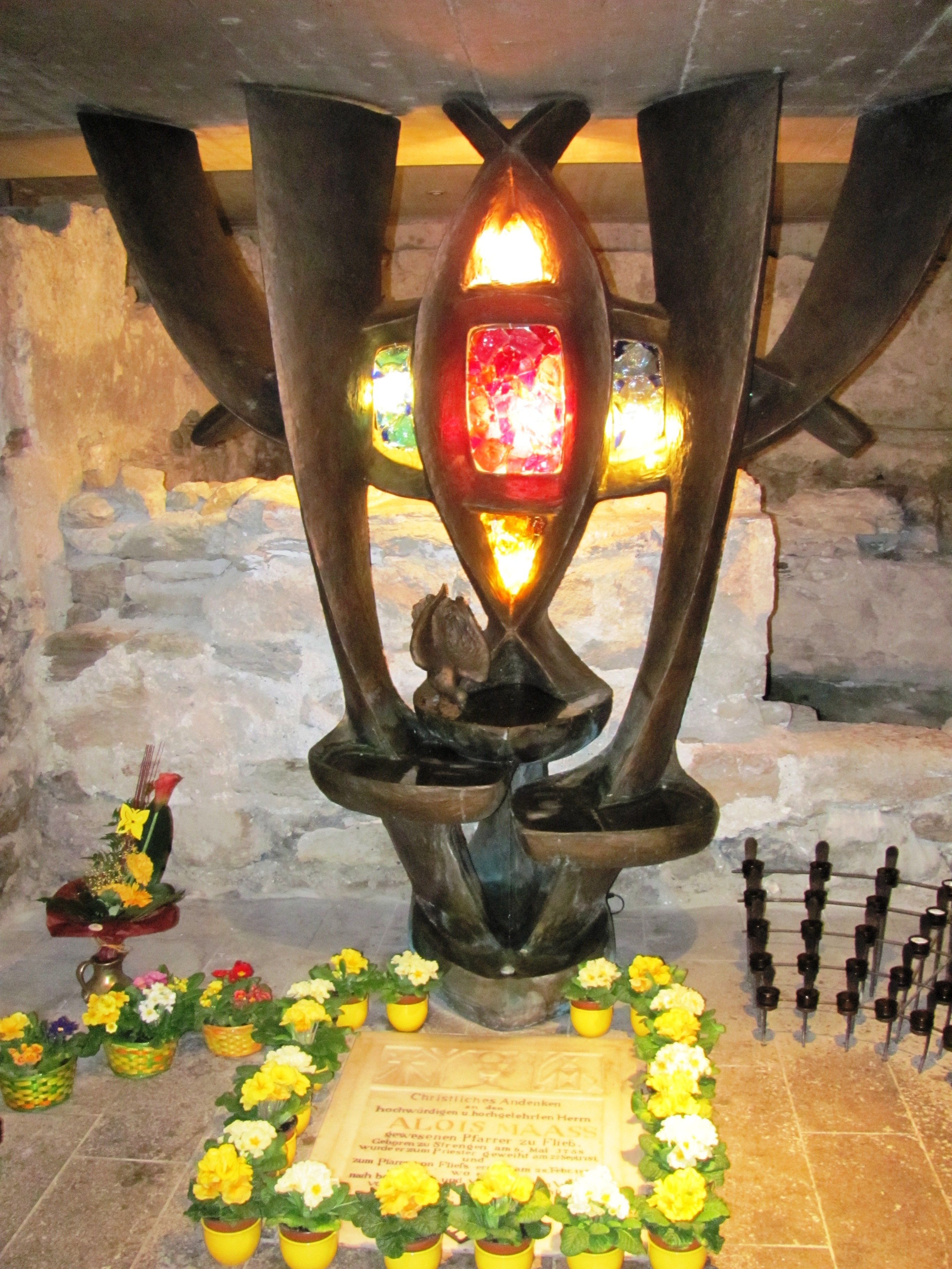 Das vom Tiroler Bildhauer Engelbert Gitterle neu gestaltete Grabmal für den "Alten Fließer Pfarrer" Simon Alois Maaß in der Krypta der Maria-Himmelfahrts-Kirche zu Fließ